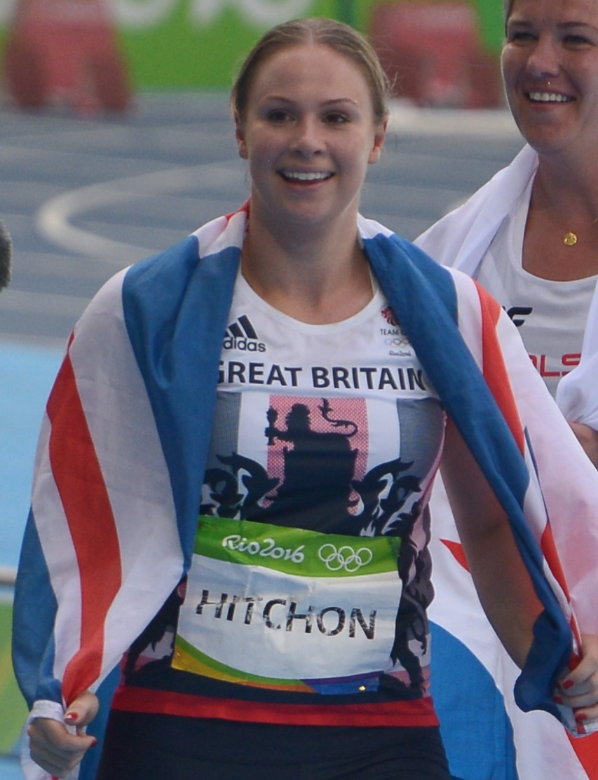 Sophie Hitchon médaillée de bronze aux JO de Rio 2016